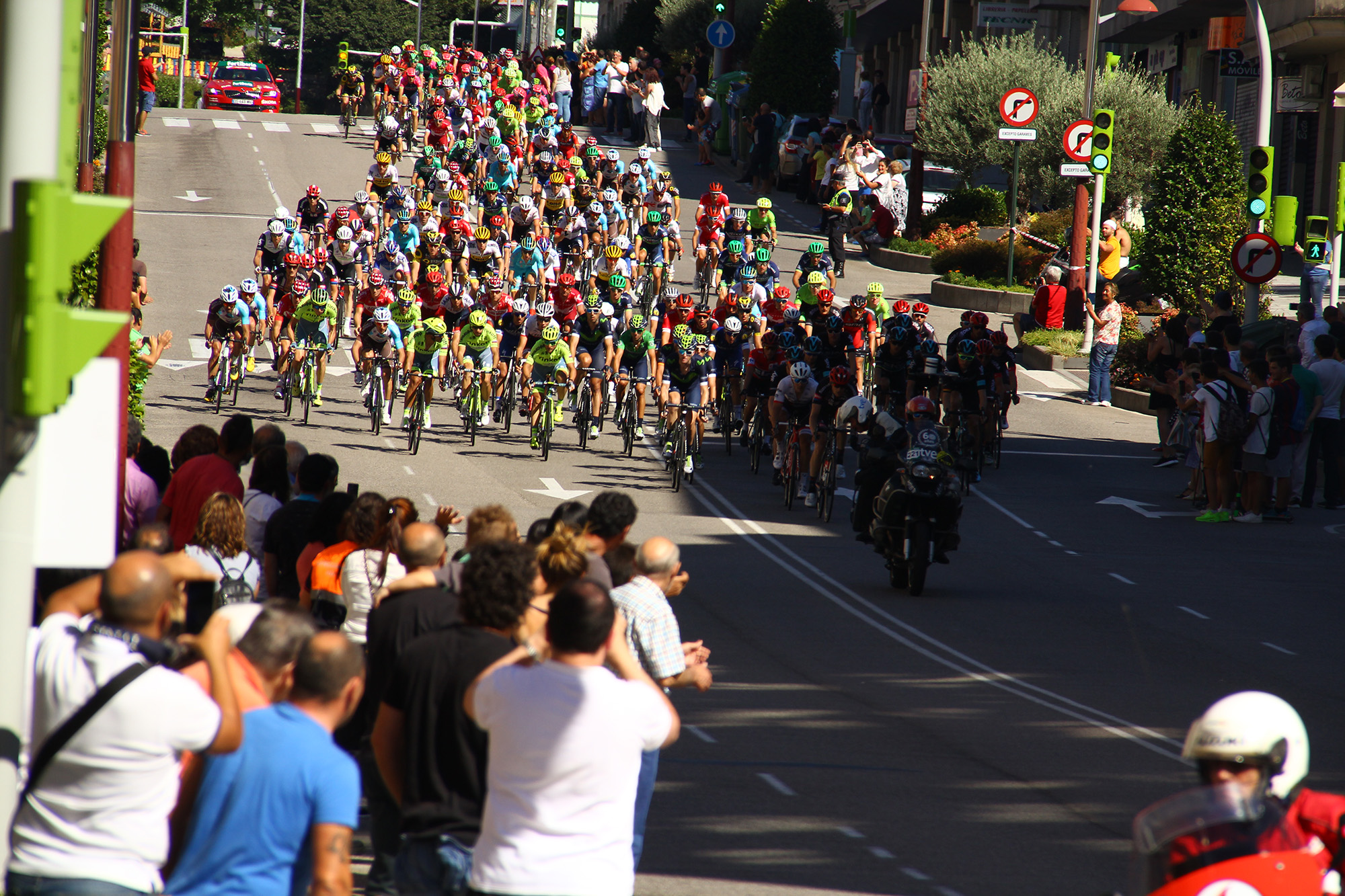 Vuelta ciclista a España. Vigo 2016